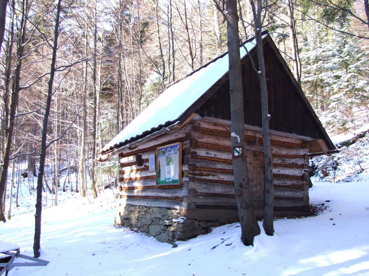 Szałas na przełęczy Pańska Przechybka w Gorcach.